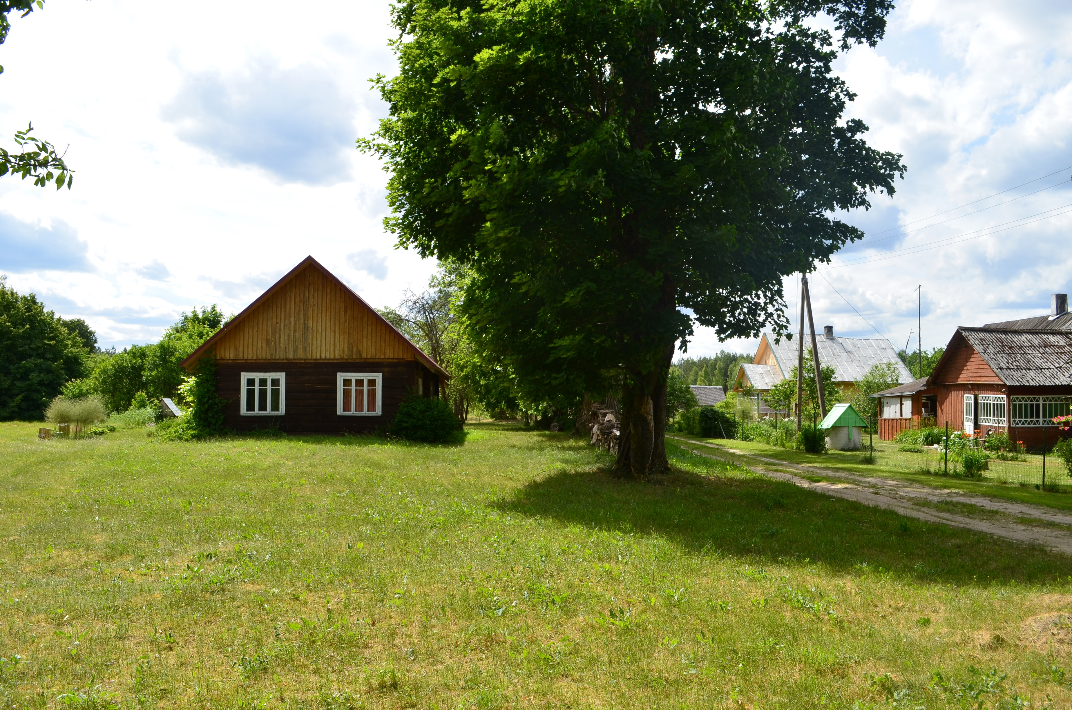 Dubas, Varėnos raj.